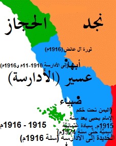 خريطة عسير ما بين سنتيّ 1915 و1916م.